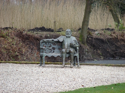 Sculpture of Maarten van Rossum by Greet Grottendieck.